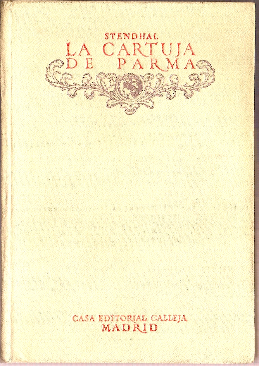 Portada del primer volumen de La cartuja de Parma, publicado por la Casa Editorial Calleja en Madrid, 1917